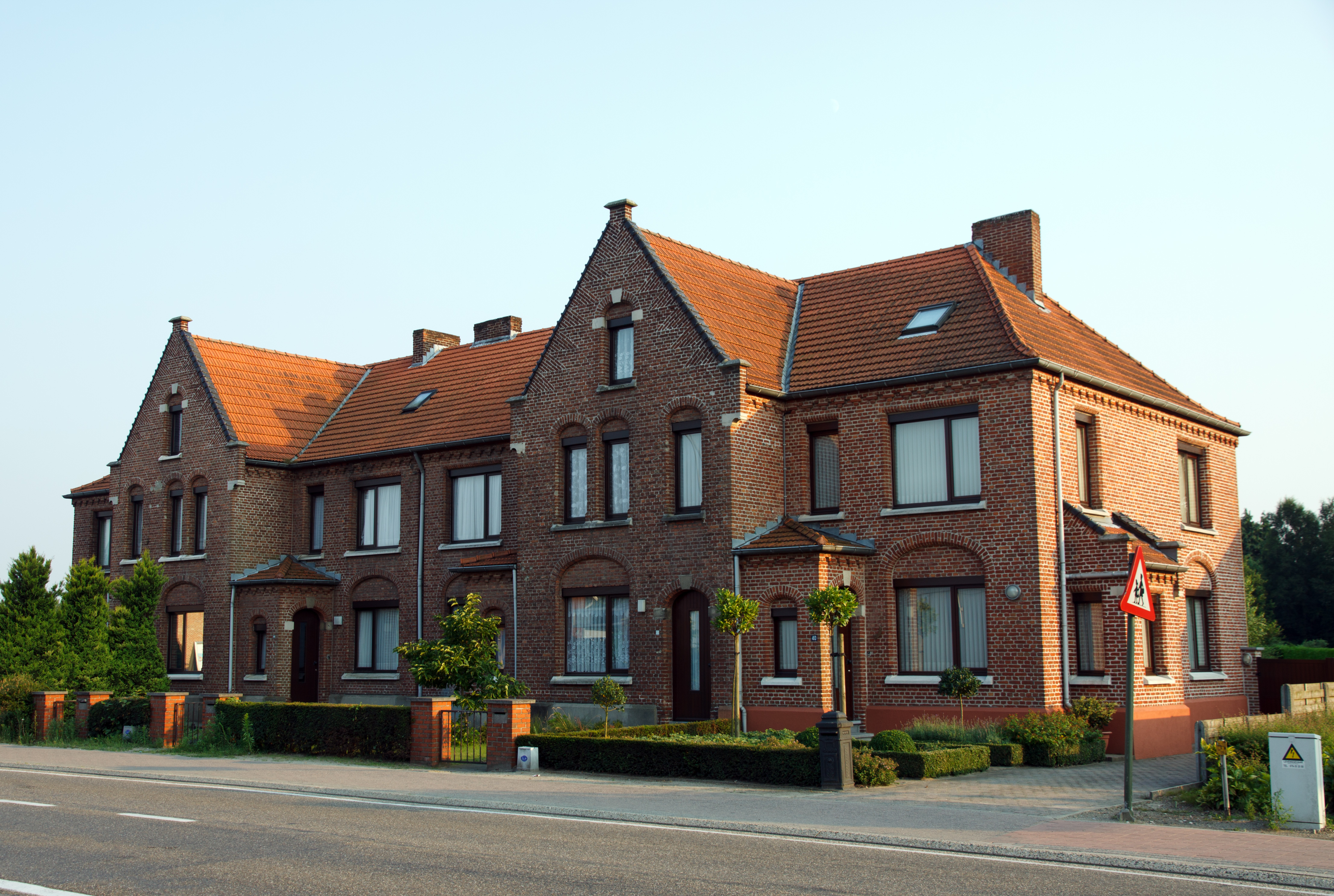 In deze woningen aan de Molderdijk 40,42,44,46,48 en 50 woonden destijds de werknemers van de Gemeensschapsinstelling voor Bijzondere Jeugdbijstand 'De Kempen'. Thans privéwoningen.